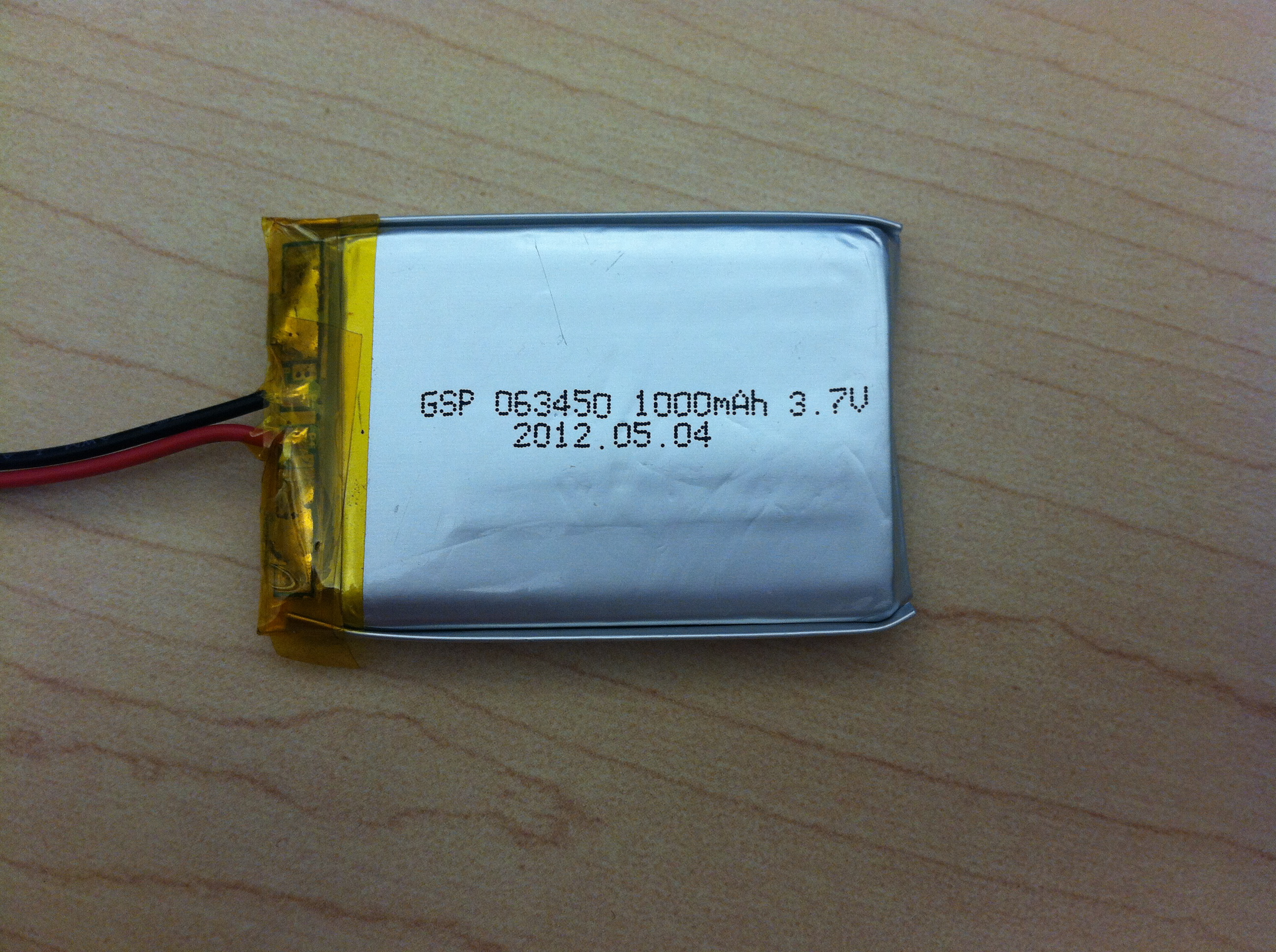 Автор: BrittanyJ - собственная работа, CC BY-SA 3.0